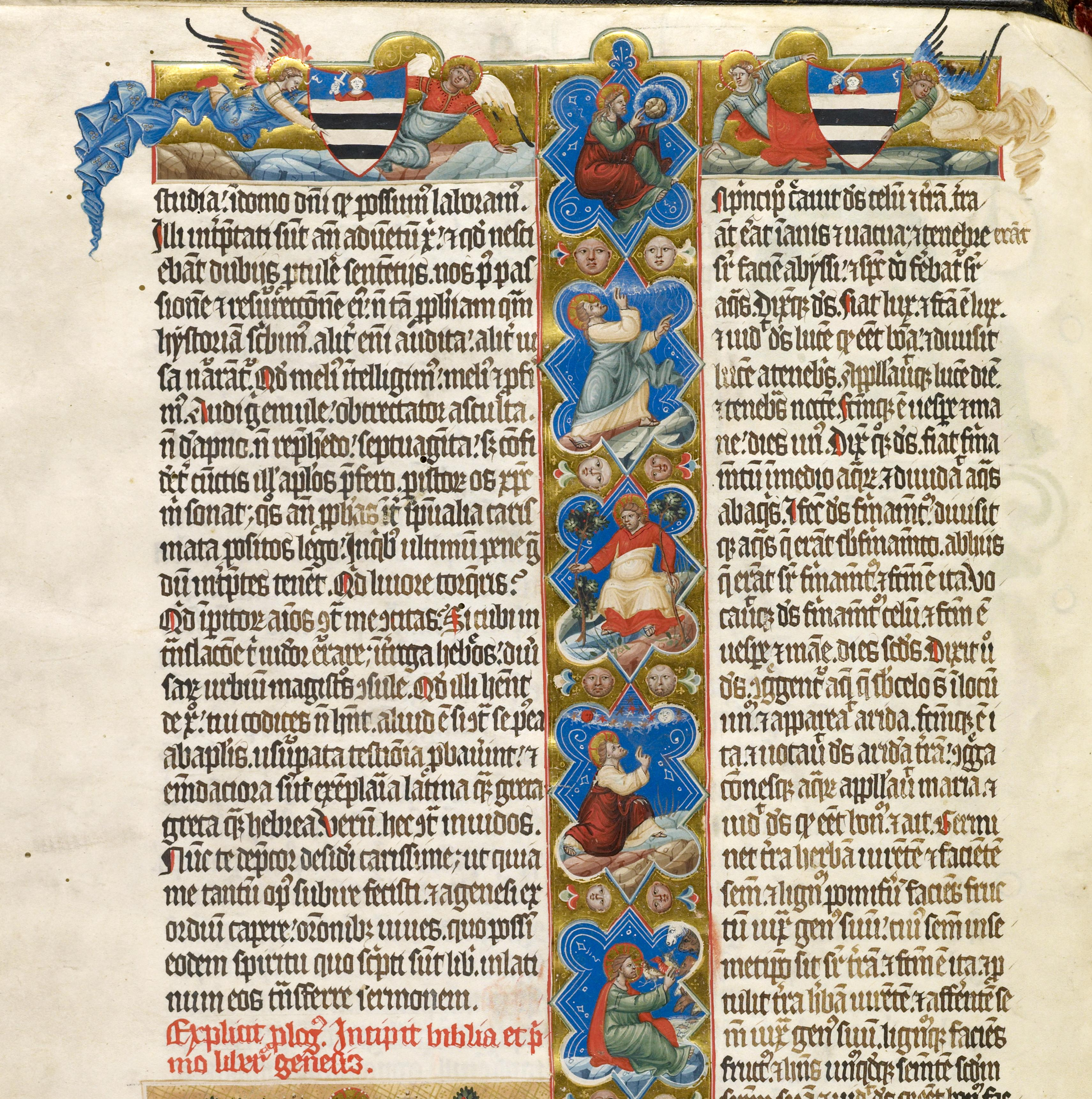 A világ teremtése bibliai jelenetek a Nekcsei biblia miniatúráin, Washington D. C., Library of Congress